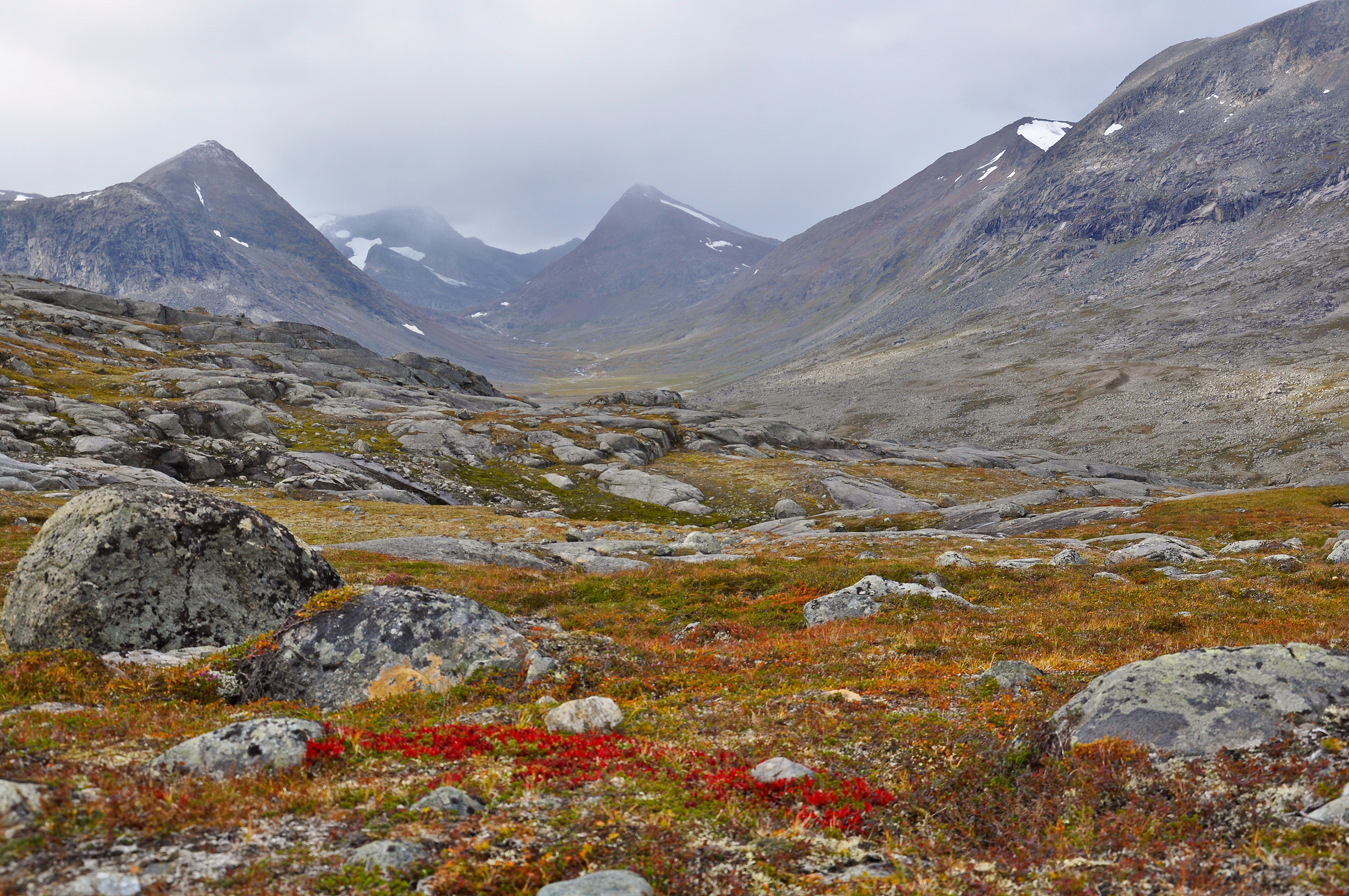 Blick von Hunddalen (Nordlands fylke) Richtung Westen ins Tal Huddalsbotnen